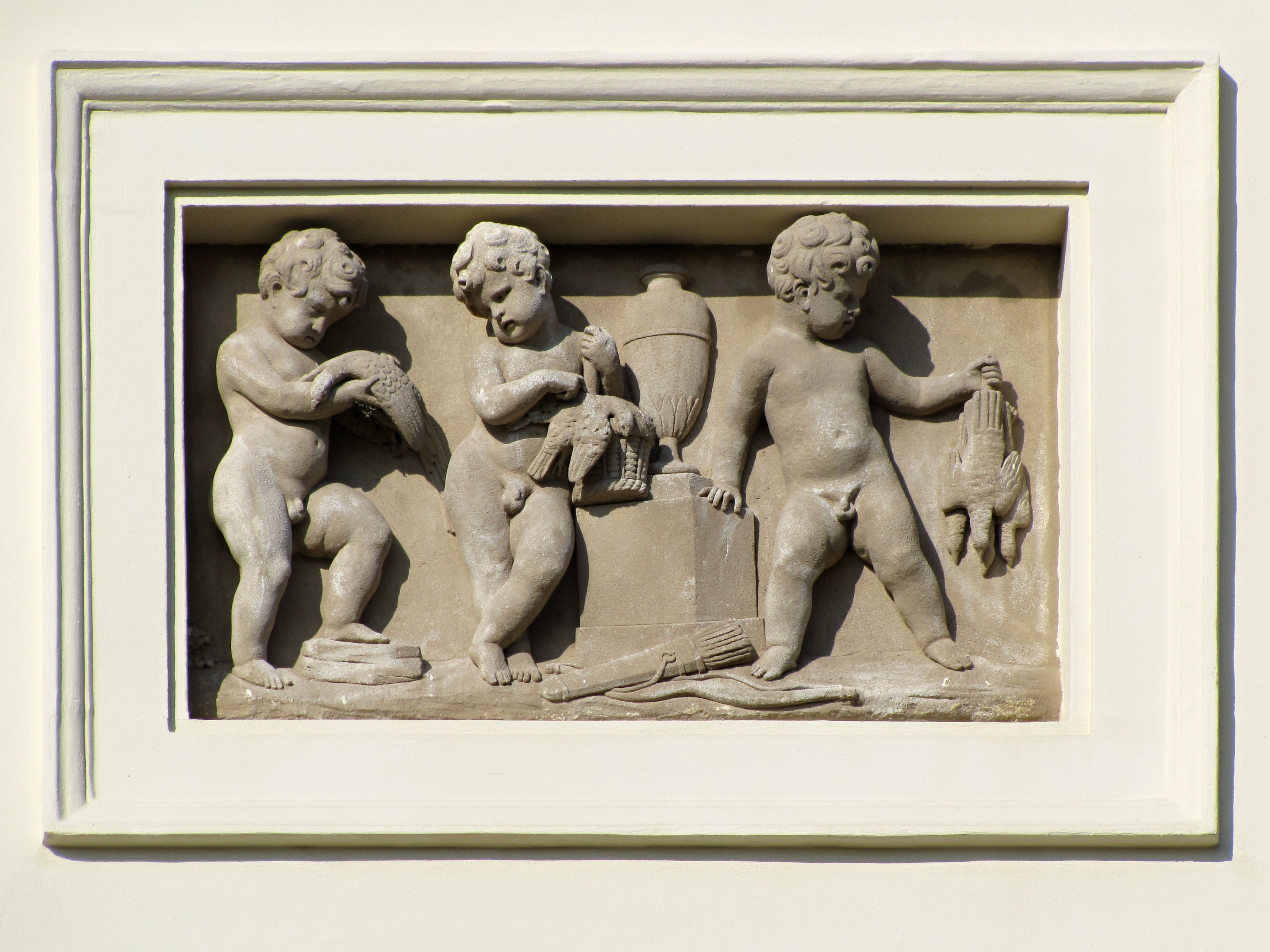 Zámek Pohansko u Břeclavi – plastika na jižní straně fasády